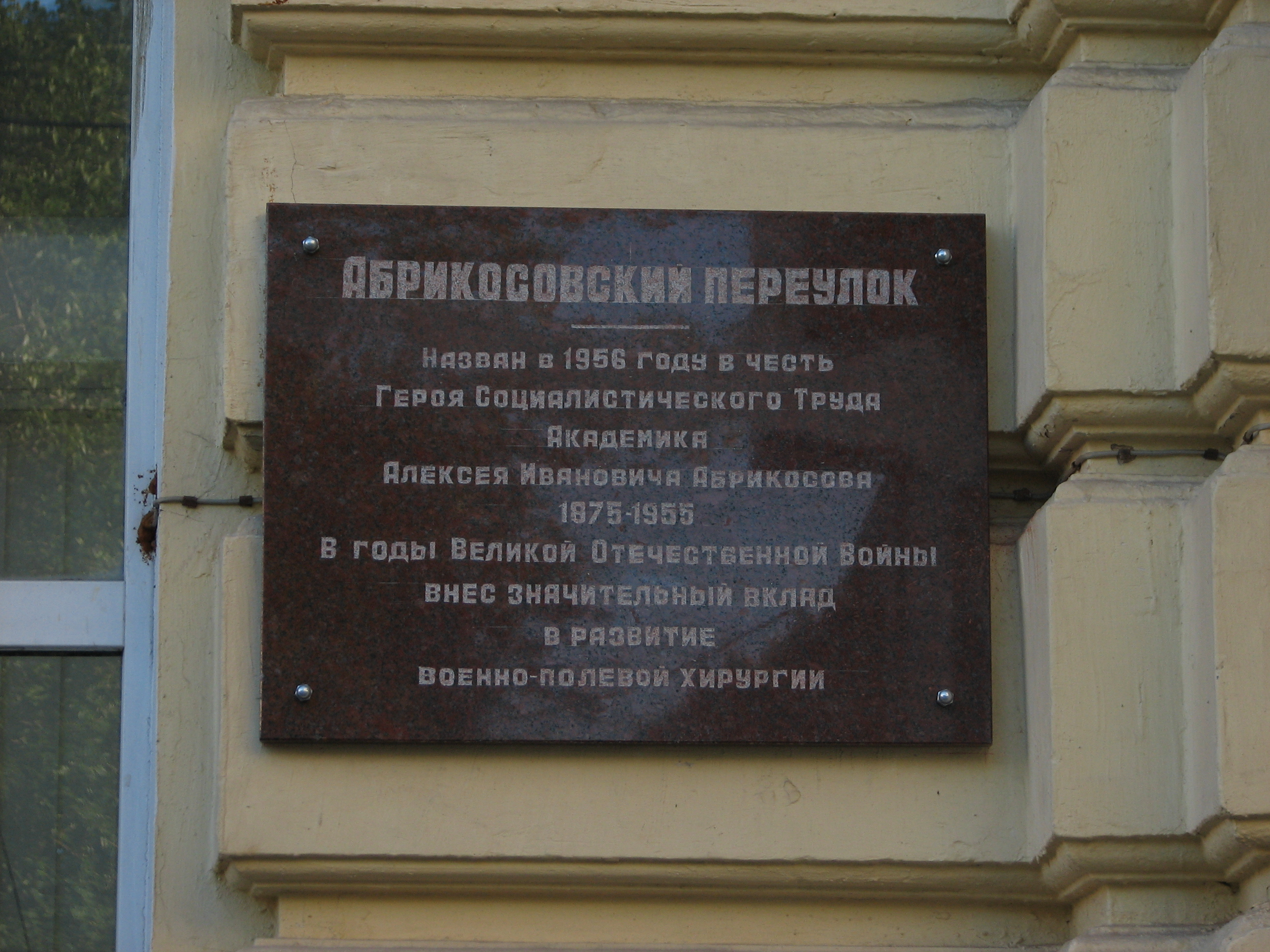 Мемориальная доска в честь академика А. И. Абрикосова на на здании патолого-анатомического корпуса 1-го Медицинского института в Абрикосовском переулке в Москве.